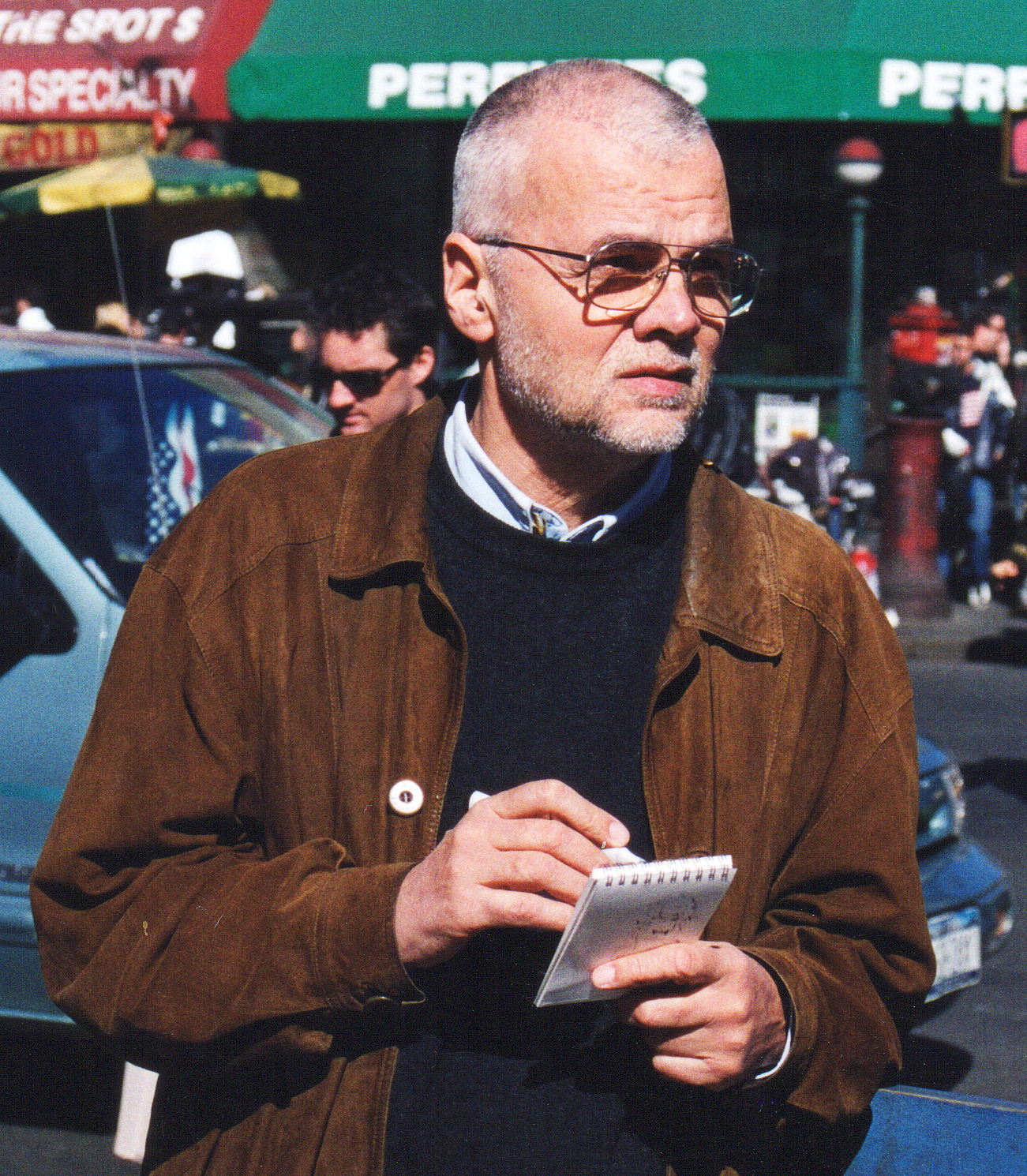 Werner Koch in New York 2001